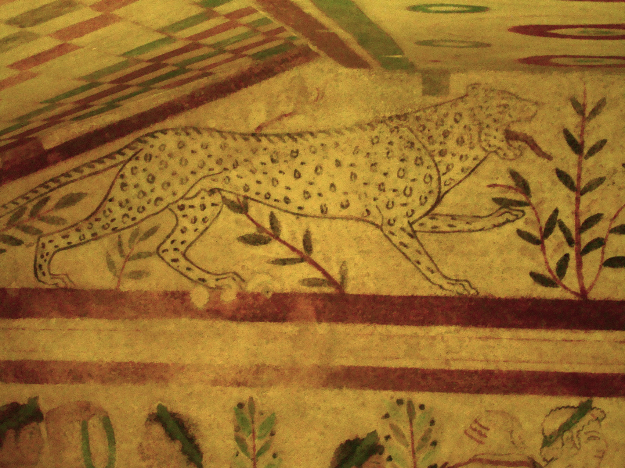 Tomba dei Leopardi Museo archeologico nazionale tarquiniense - MIBAC This is a photo of a monument which is part of cultural heritage of Italy.